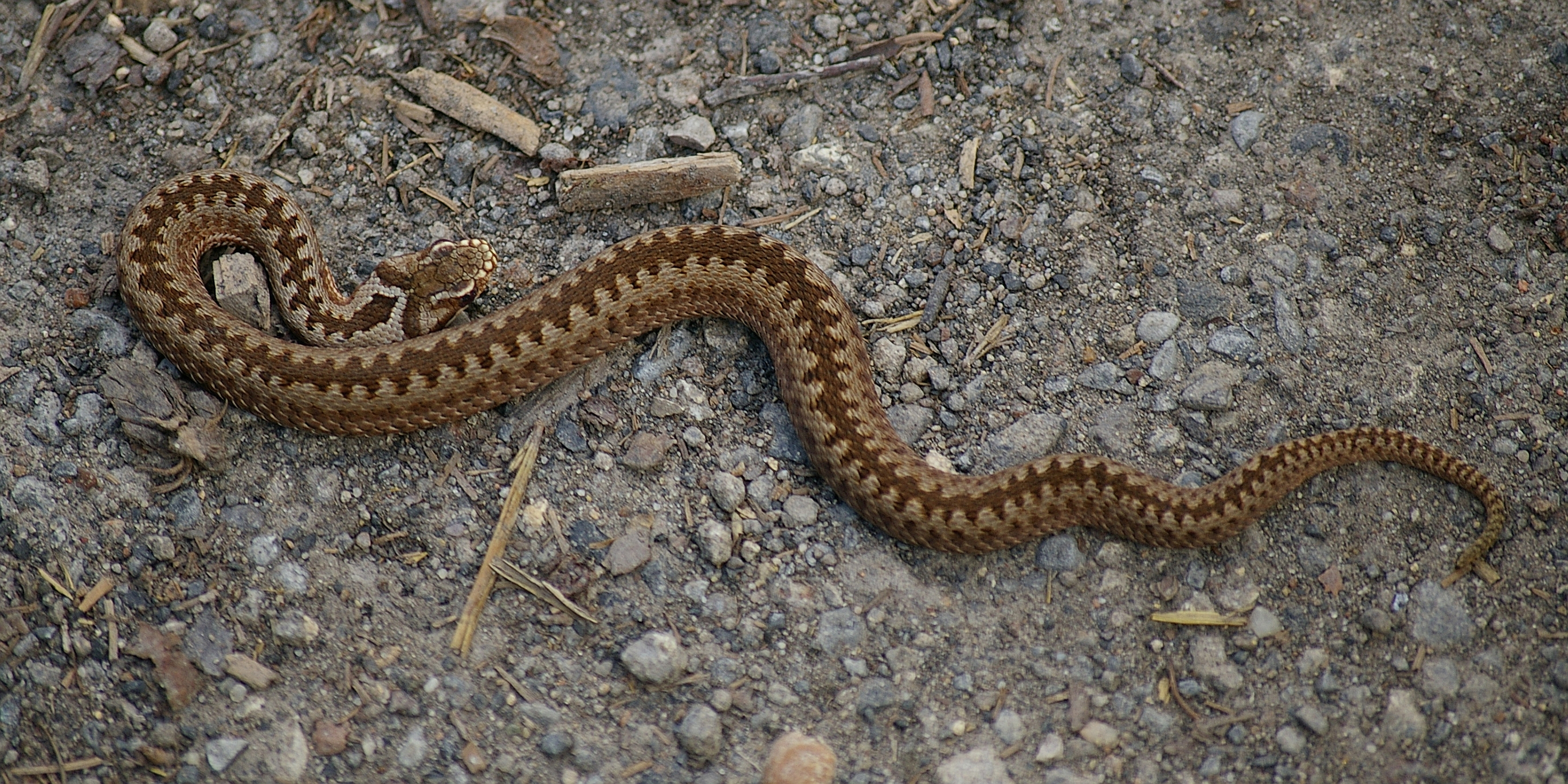 Vipera berus. Żmija zygzakowata.